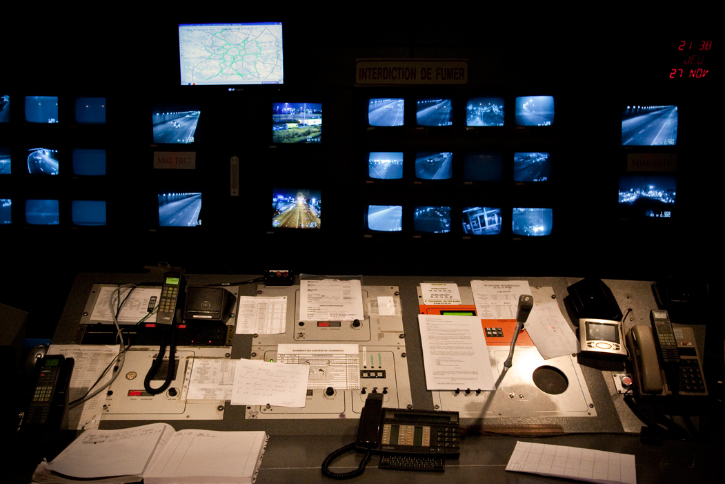 Pc de securite